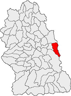 Categorie:Hărţi ale judeţului Hunedoara